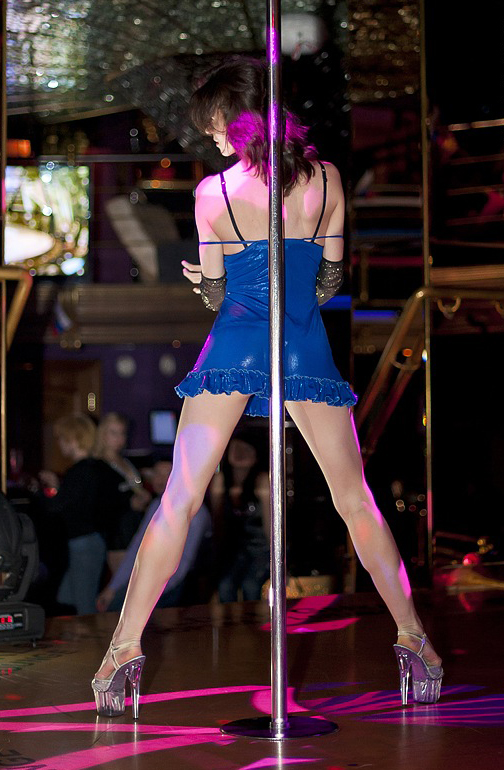 Стриптиз - танец с шестом